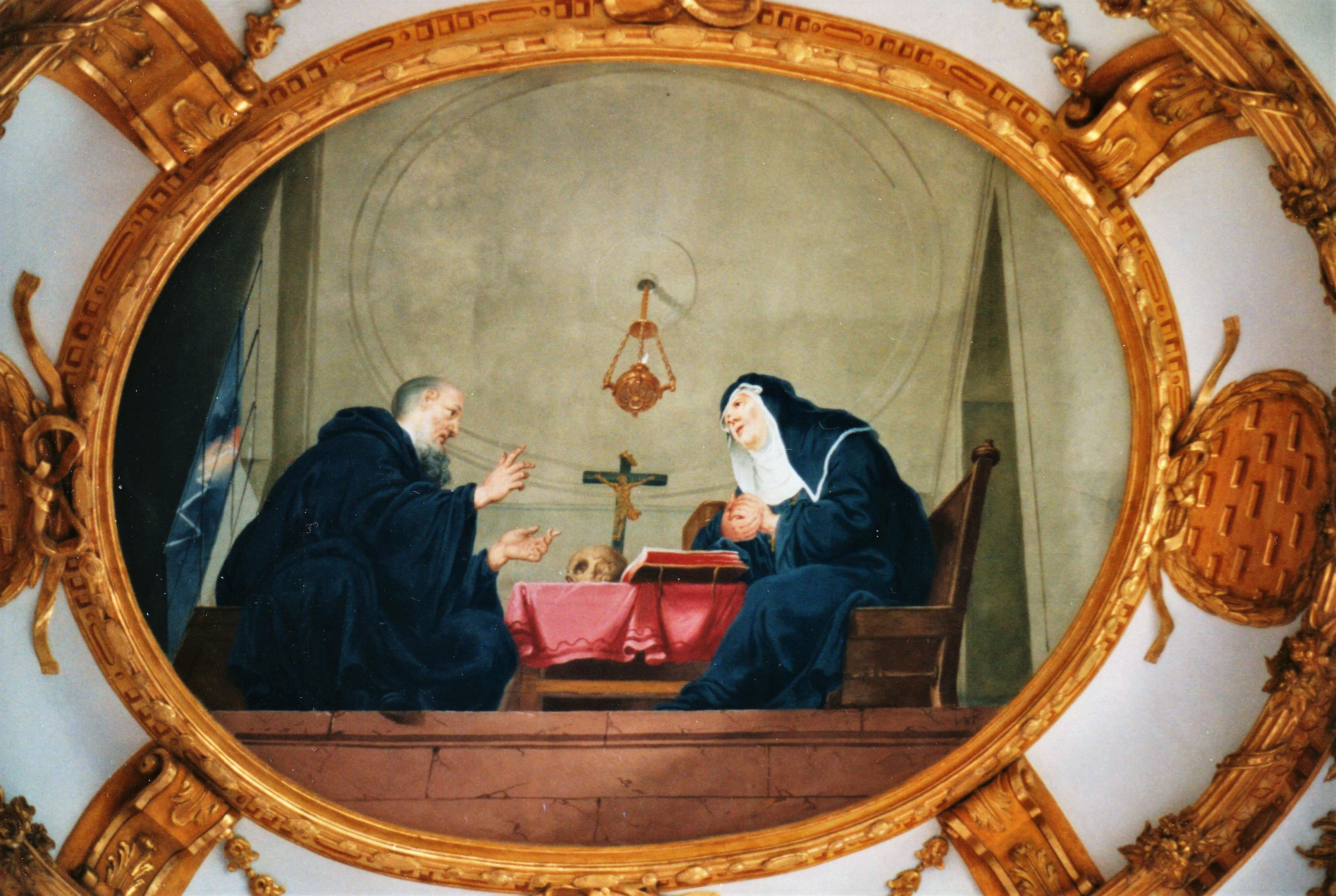 Klosterkirche Elchingen, Deckenfresko, Szene aus der Benediktlegende: Benedikt im Gespräch mit Scholastika